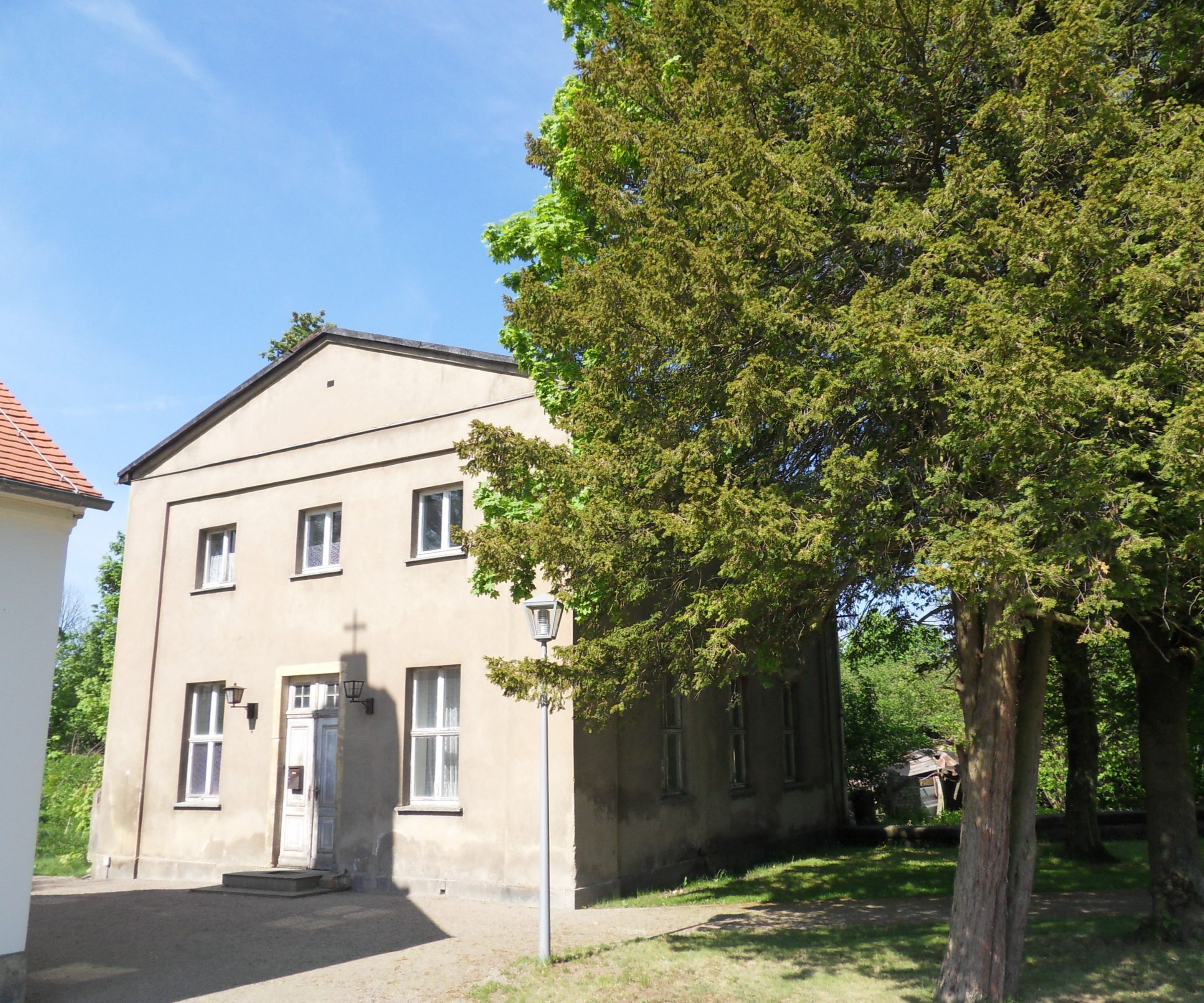 Denkmalgeschütztes Kavaliershaus im Schlosspark in Lauchhammer-West